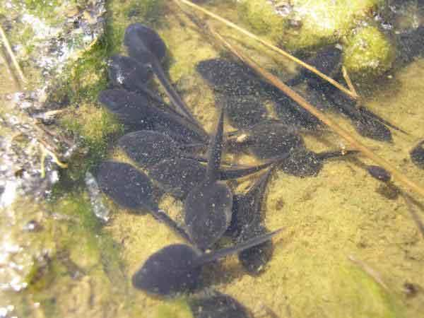 Bufo viridis tadpoles from Chios, Greece